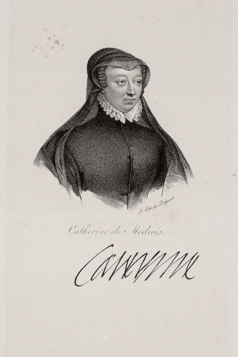 lithographie/estampe de François-Séraphin Delpech (1778-1825)